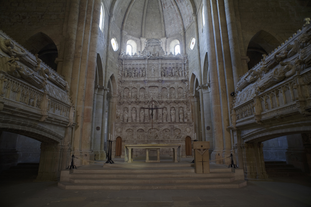 unidentified Spain